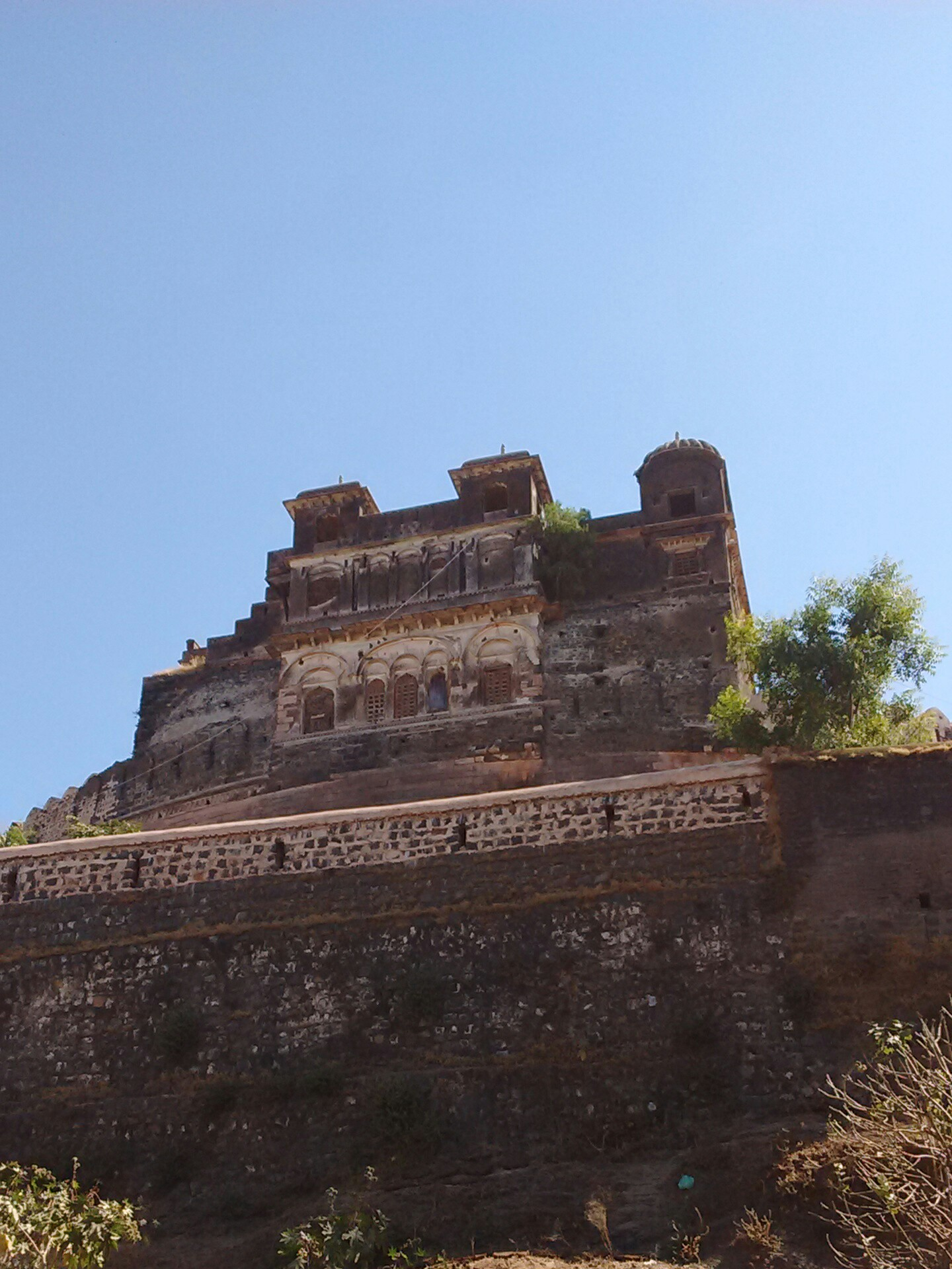 Kharbuza Mahal, Dhar, Madhya Pradesh